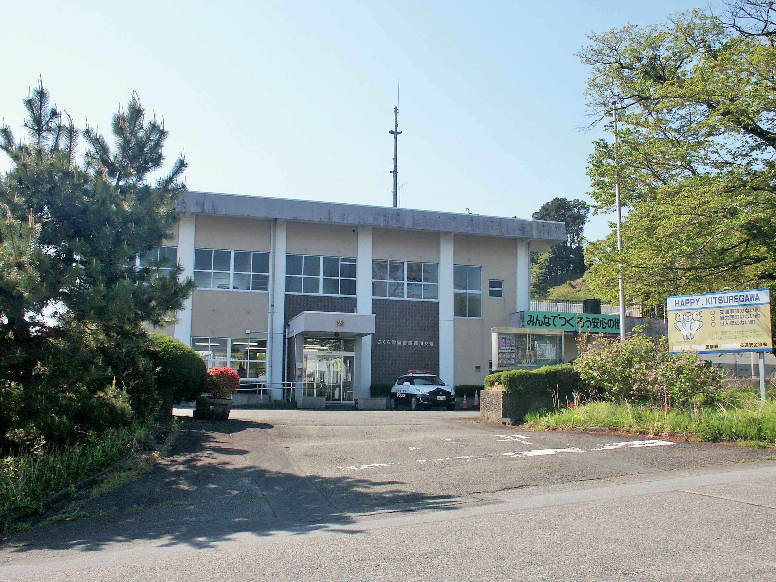 さくら警察署喜連川交番（旧喜連川警察署）庁舎